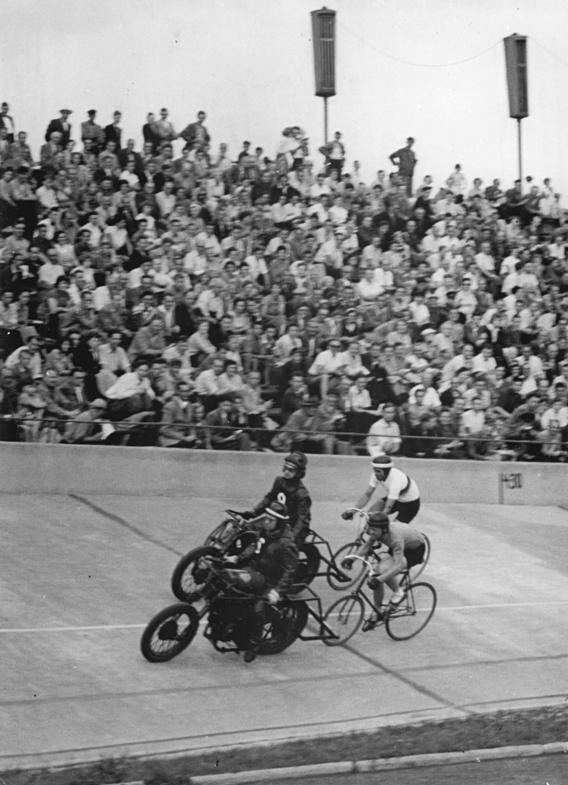 Aurich, Zieger, Schoppenhauer, Lothar Meister Zentralbild Kriegel 16.7.1957 Deutsche Meisterschaften der Radsportler der DDR in Zwickau Anziehungspunkt für mehr als 6.000 (6.000) Einwohner der Bergarbeiterstadt Zwickau waren die Meisterschaftsläufe im Dauerfahren, Tandemmalfahren und Verfolgungsfahren, die am 15.7.1957 im Georgi-Dimitroff-Stadion ausgetragen wurden. In der deutschen Meisterschaft im 4.000 (4.000) m Einzelverfolgungsfahren siegte der Titelverteidiger Siegfried Köhler Nr. 25 vom SC Einheit Berlin in der Zeit von 5:12,0 und fuhr damit zugleich einen neuen deutschen Rekord. Zweiter war Seidel SC-Semper Berlin und 3. Klieme SC-Dynamo Berlin. (2. in 5:26,1-3. in 5:26,9) UBz:Zieger-Aurich beim Überrunden von Lothar Meister I, der hinter Schoppenhauer fuhr.